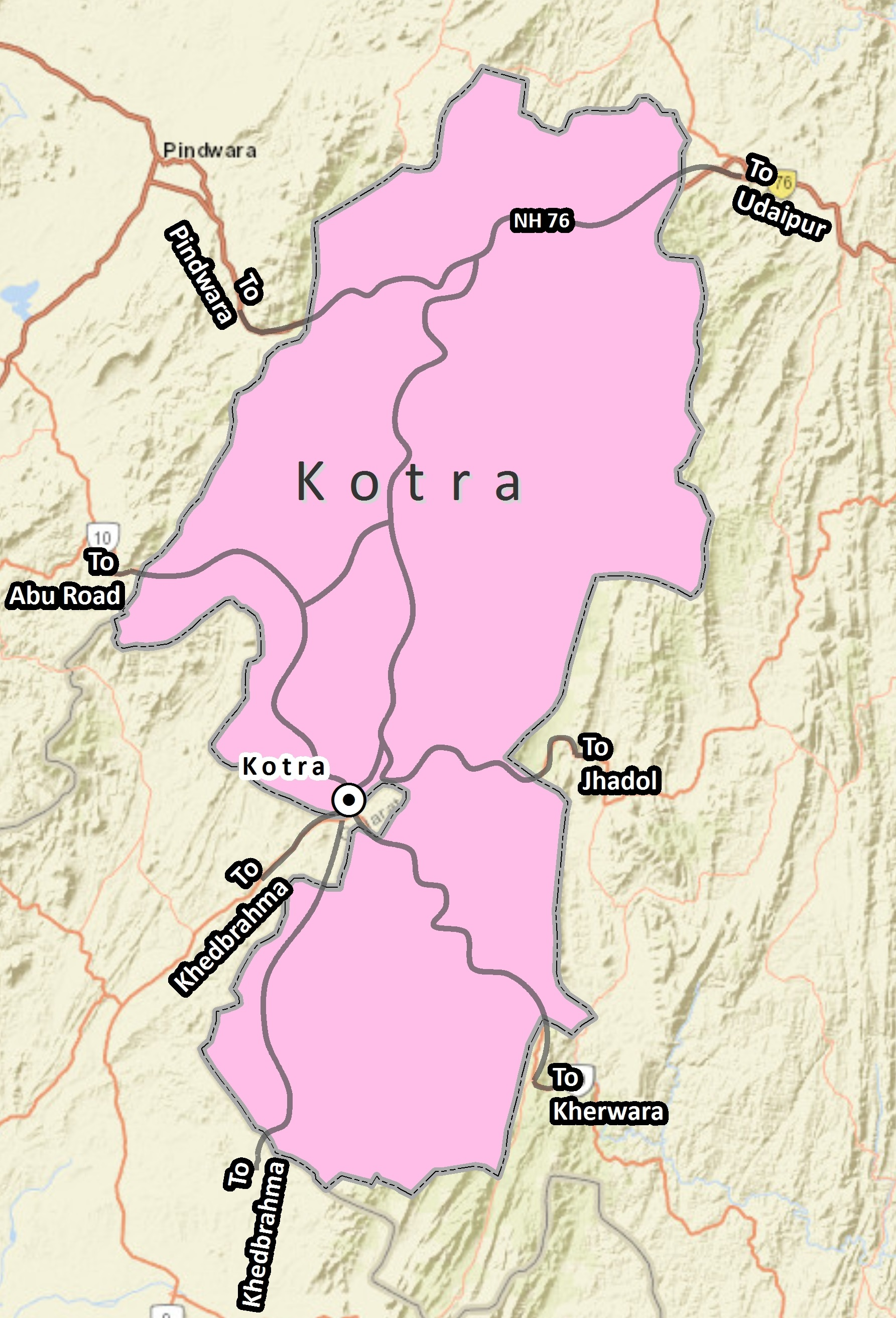 कोटड़ा तहसील की मुख्य सड़के